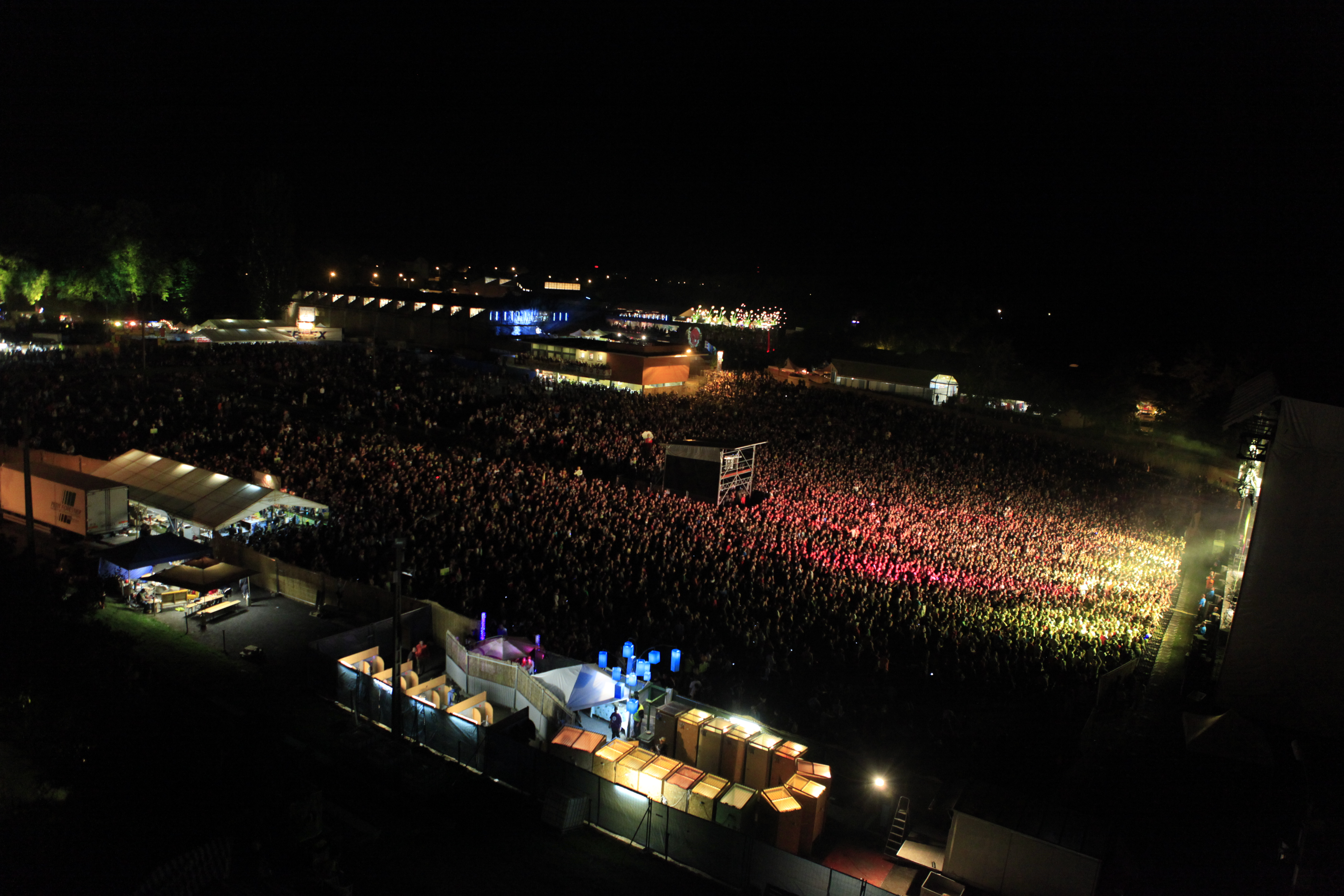 20 000 personnes devant Franz Ferdinand à l'Eco Festival Cabaret Vert 2012